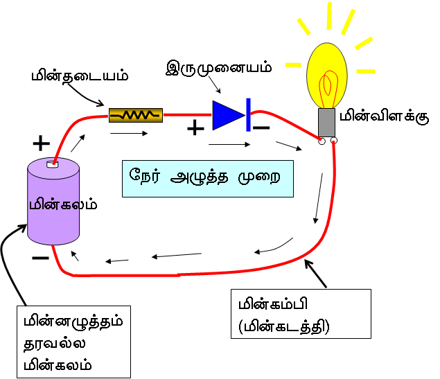 The figure was created by me, C.R.Selvakumar, and I give full permission to copy, and modify as specified in GNU Free Documentaion License and relese it into the public domain. பகுப்பு:தமிழில் விளக்க வரைபடங்கள்